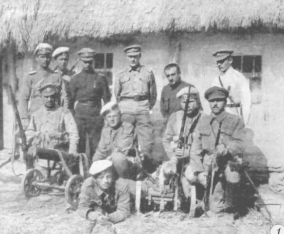 Пулеметный расчёт Алексеевцев, Юг России, 1919 год.